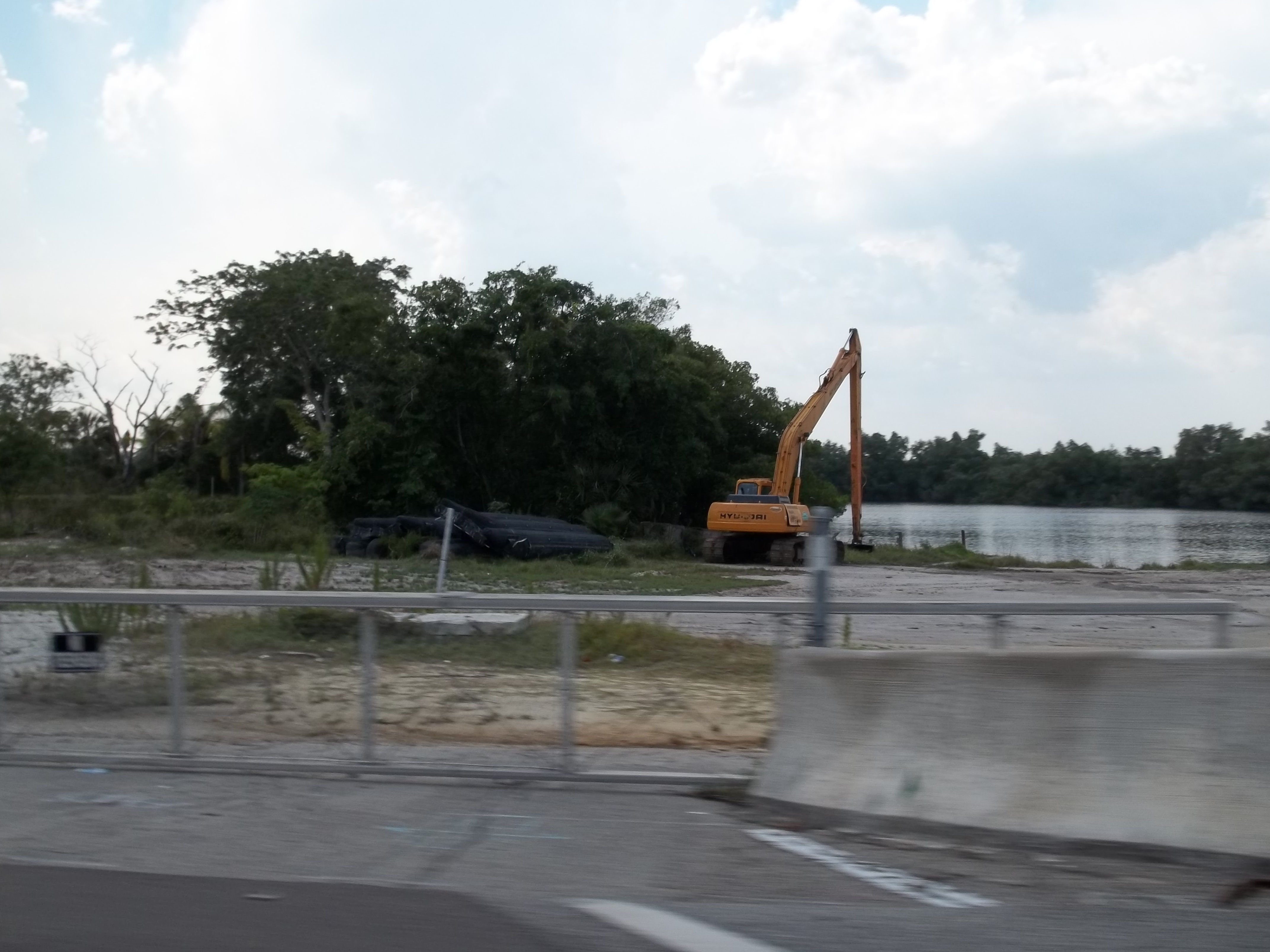 Fort Myers, Florida: Menge-Hansen Marine Ways